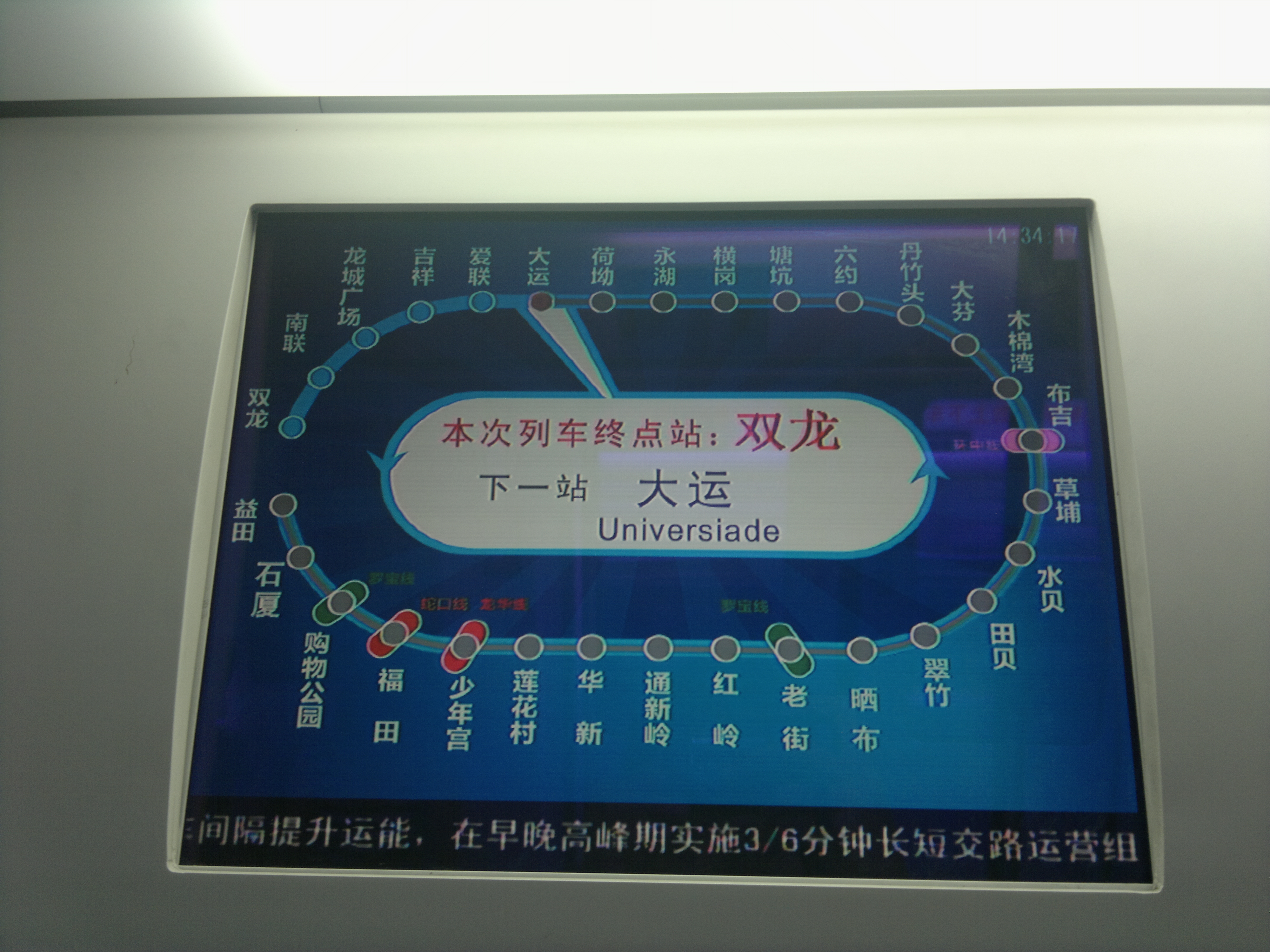 车门上方的液晶显示屏